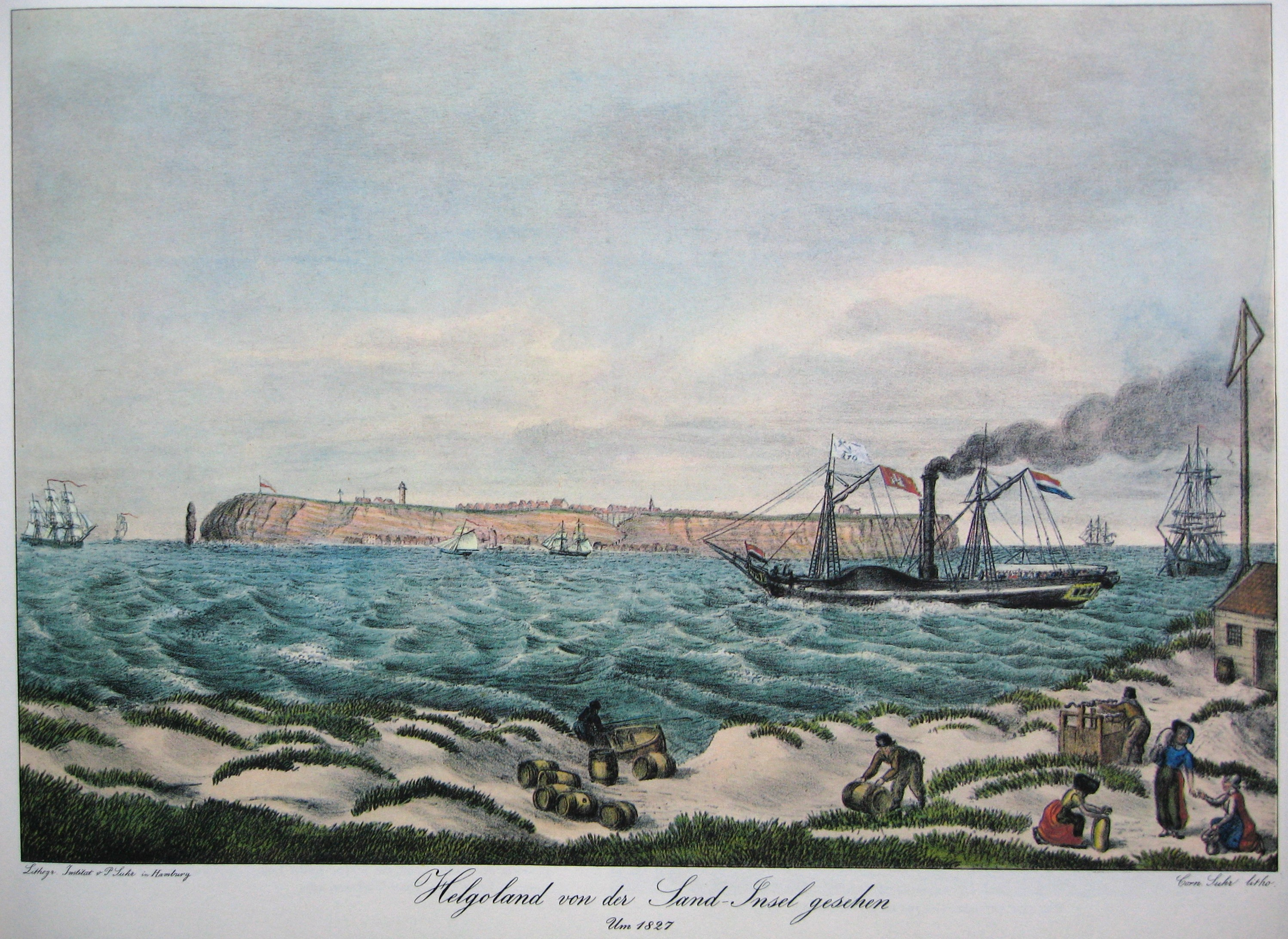 Stahlstich von 1827.